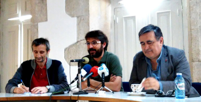 Évole, entre os xornalistas Xaime Leiro e Xosé Manuel Pereiro, en Compostela.